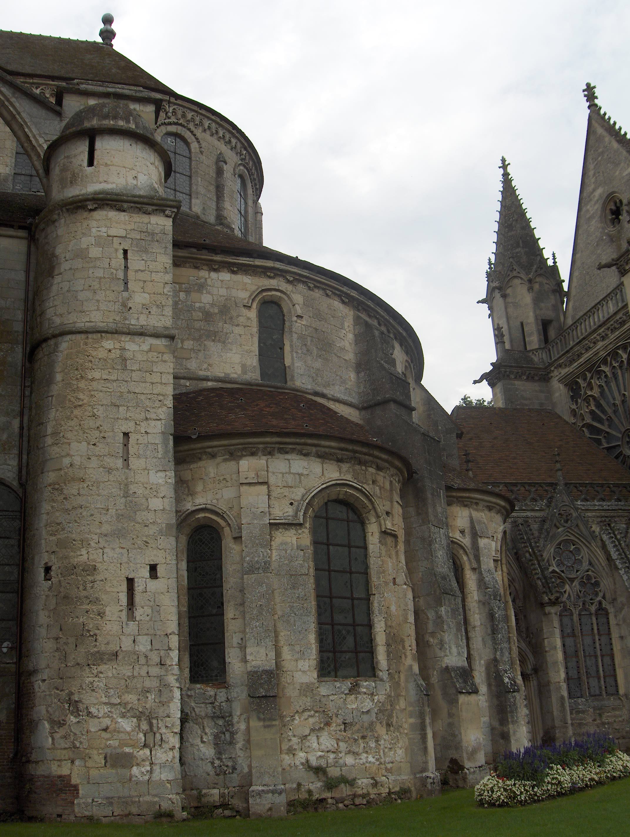 Transition entre le style ogivo-roman de l'église abbatiale et le style gothique de la sainte chapelle (Saint-Germer-de-Fly, Oise, Picardie)